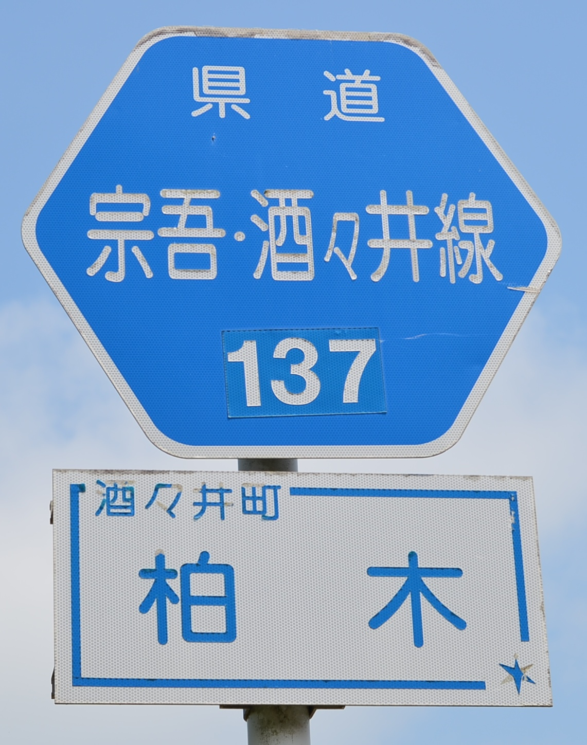 千葉県道137号宗吾・酒々井線の道路標識